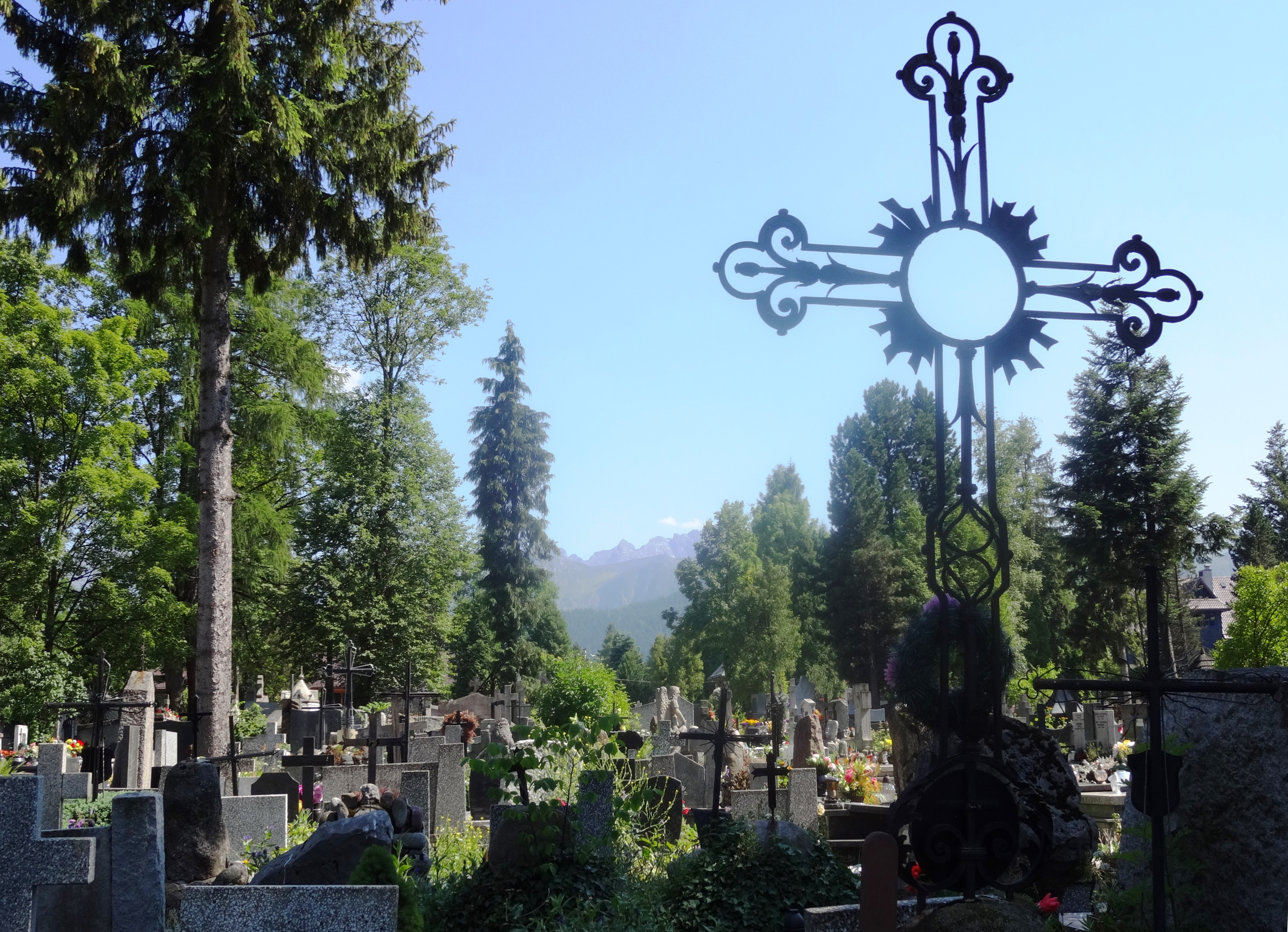 New Cemetery in Zakopane